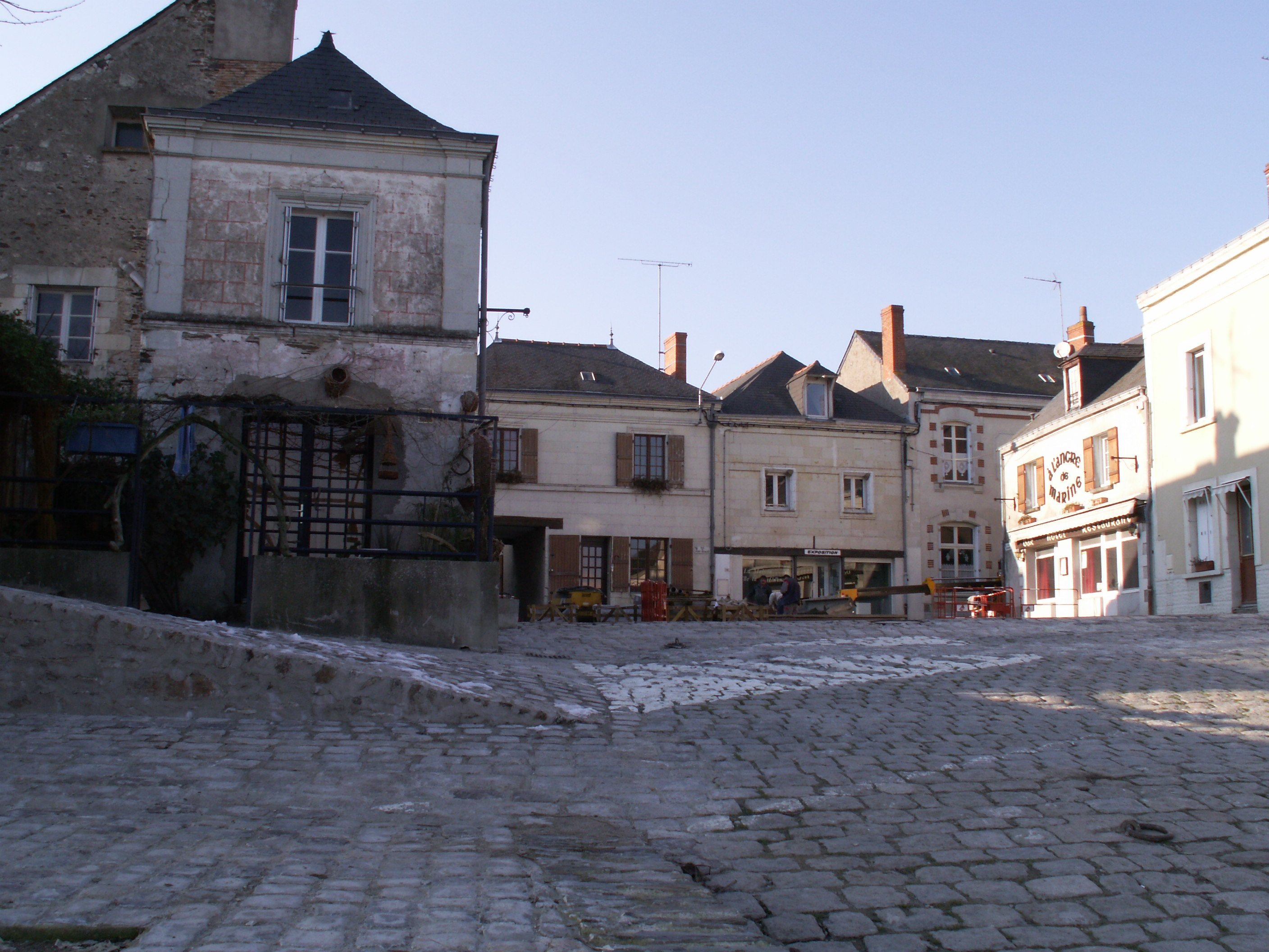 Place à la Pointe, Bouchemaine, Maine-et-Loire, France.